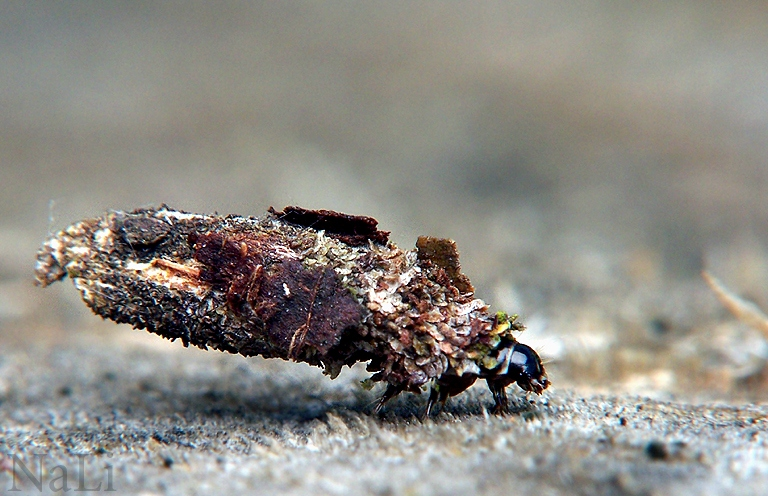 Psychidae